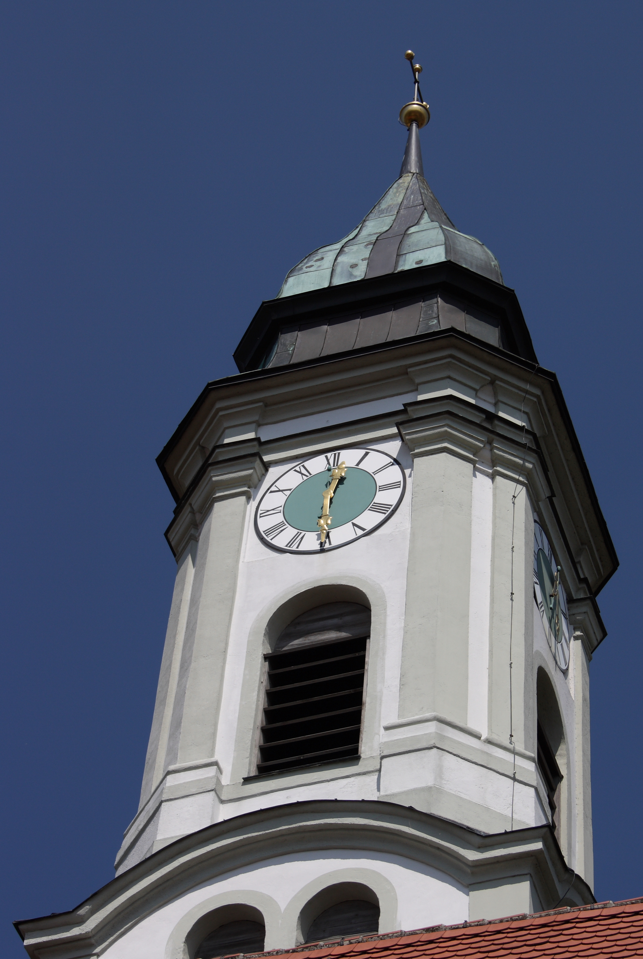 Katholische Pfarrkirche St. Georg in Westendorf, einer Gemeinde im Landkreis Augsburg (Bayern), Turm mit zugespitzter Mansardhaube